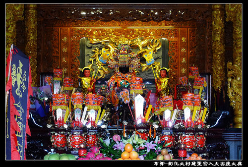 慈聖宮(媽祖)主殿一景